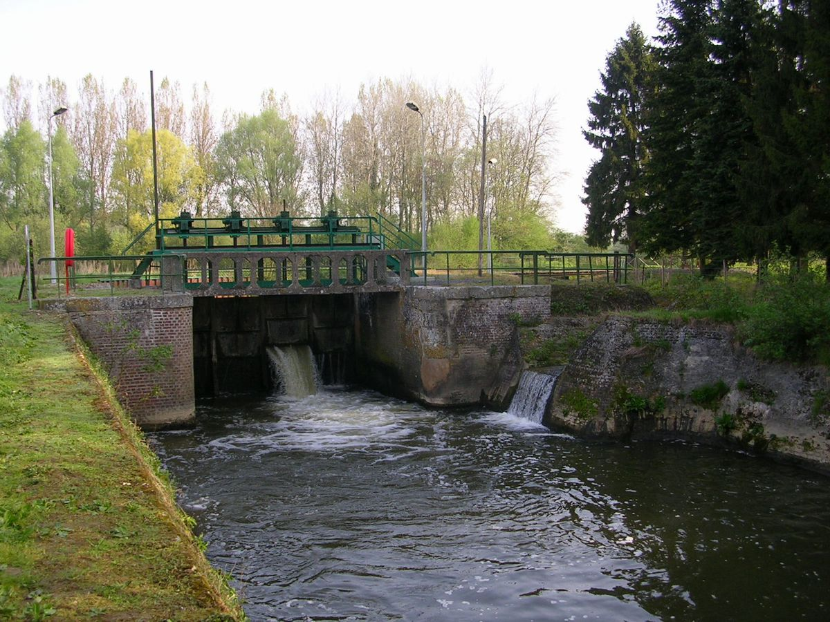 vue de dessous (très poissonneuse)